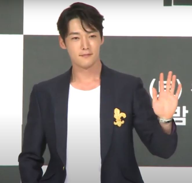 [TV텐] 3월 22일 드라마 '터널' 제작발표회 현장